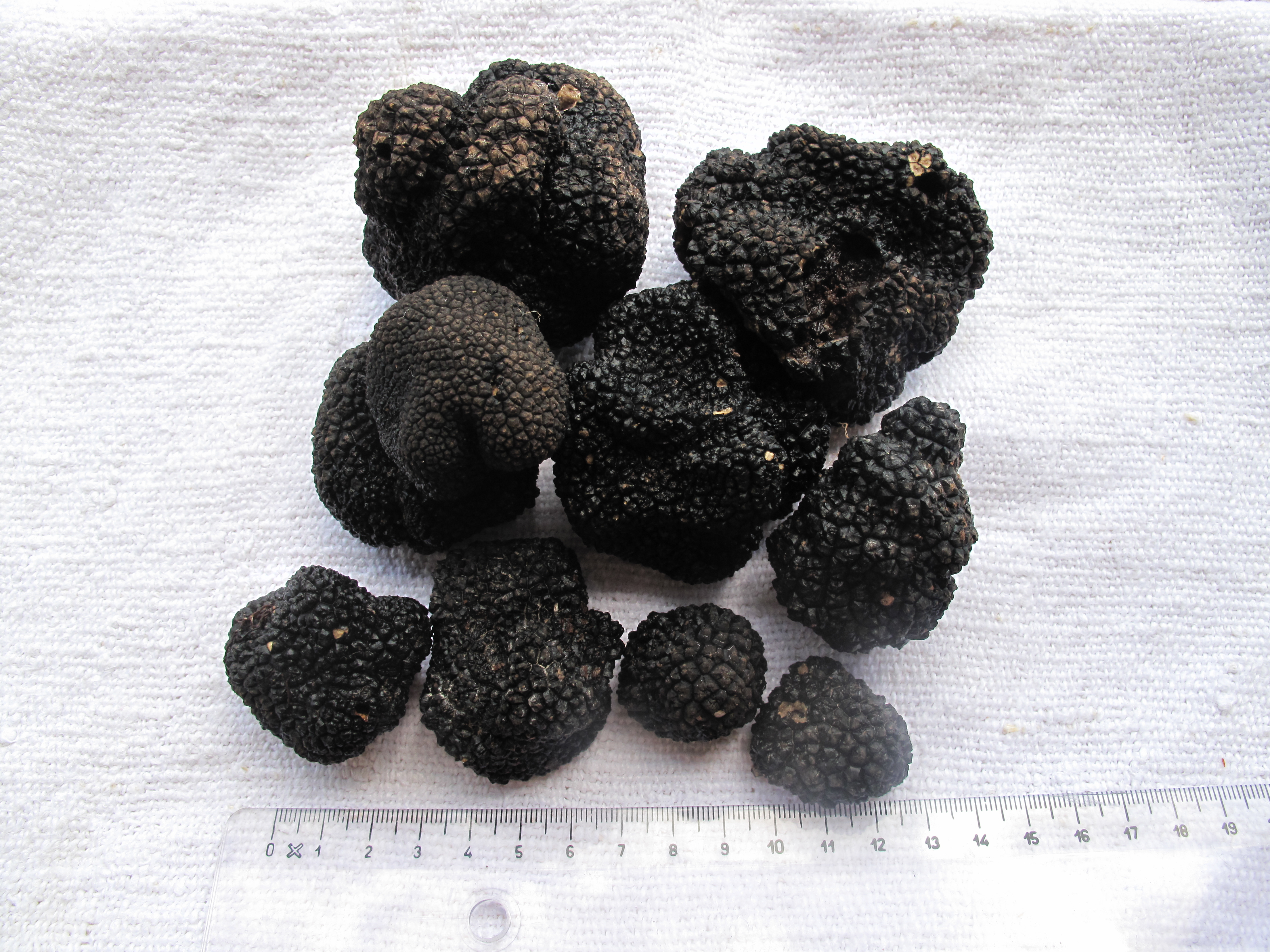 Tartufi neri estivi trovati in Valnerina il 17-07-2010